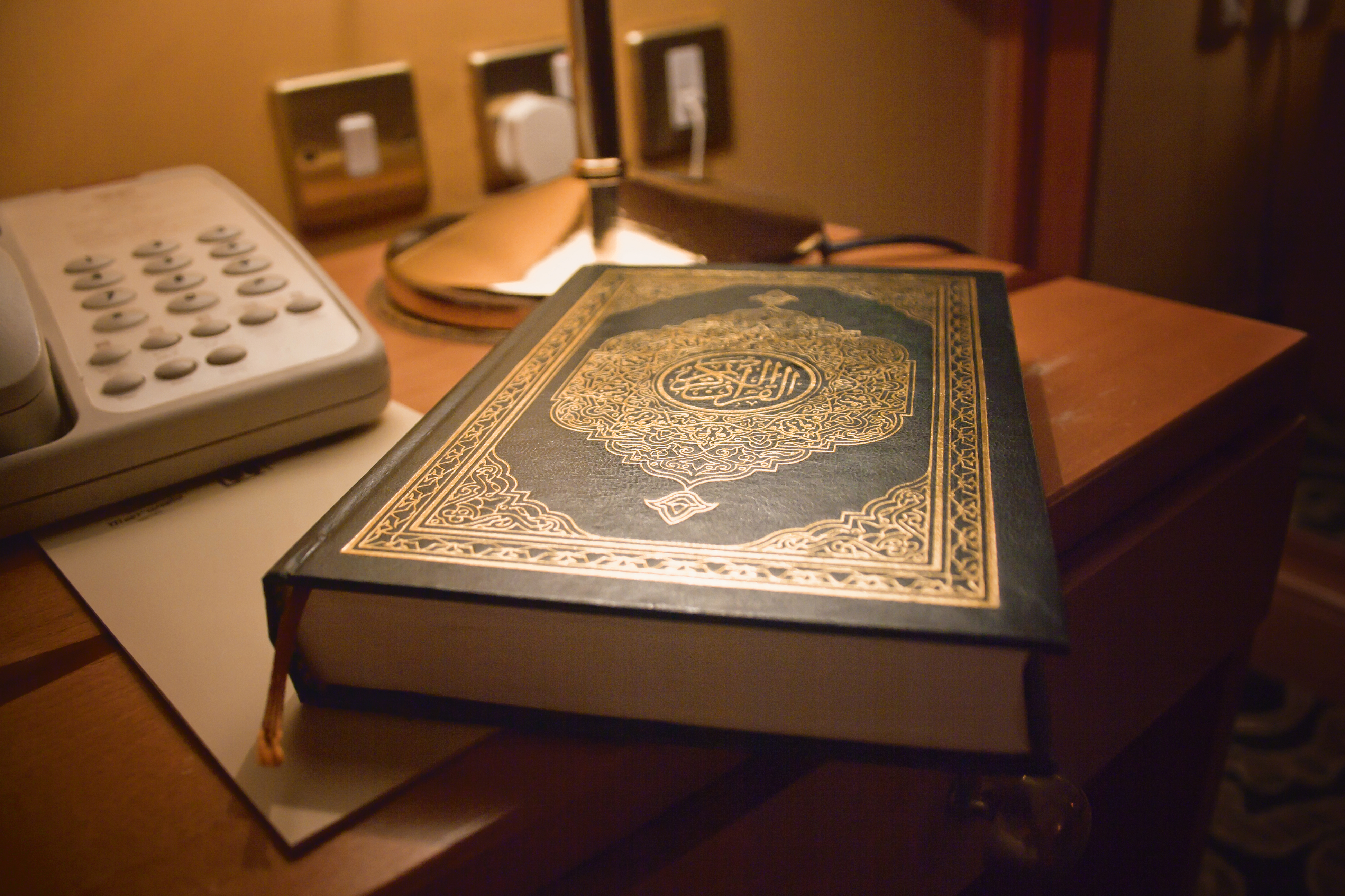 Doha, Catar